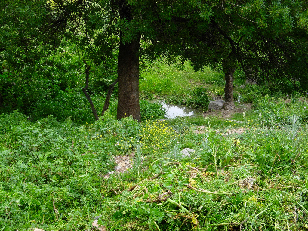 Un jardin de Messoaud Boudjriou.w;CONSTANTINE